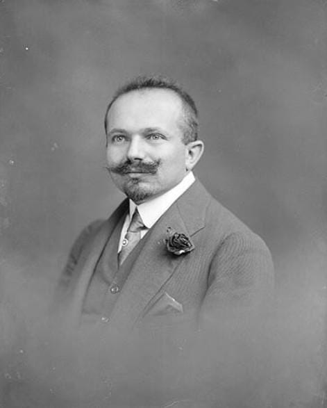 Jindřich Waldes, český podnikatel židovského původu, vlastenec a mecenáš umění